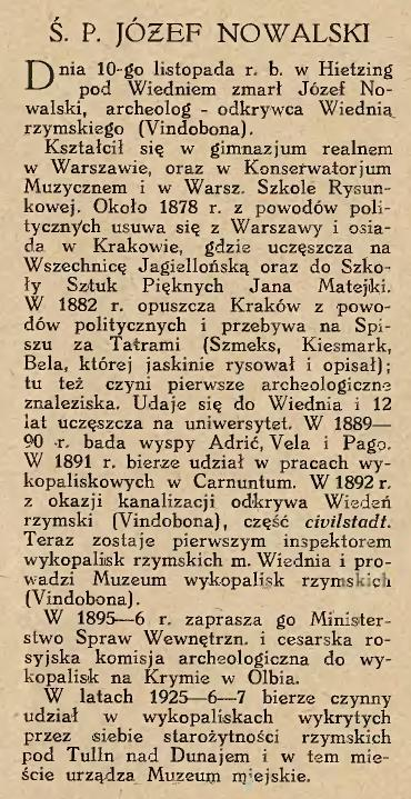 Nekrolog Józefa Nowalskiego zamieszczony w Tygodniku Ilustrowanym 1928, nr 48